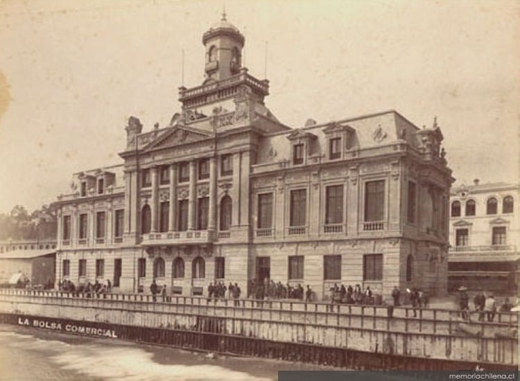 Edificio de la antigua Gobernación Marítima de Valparaíso, demolida luego del terremoto de 1906.